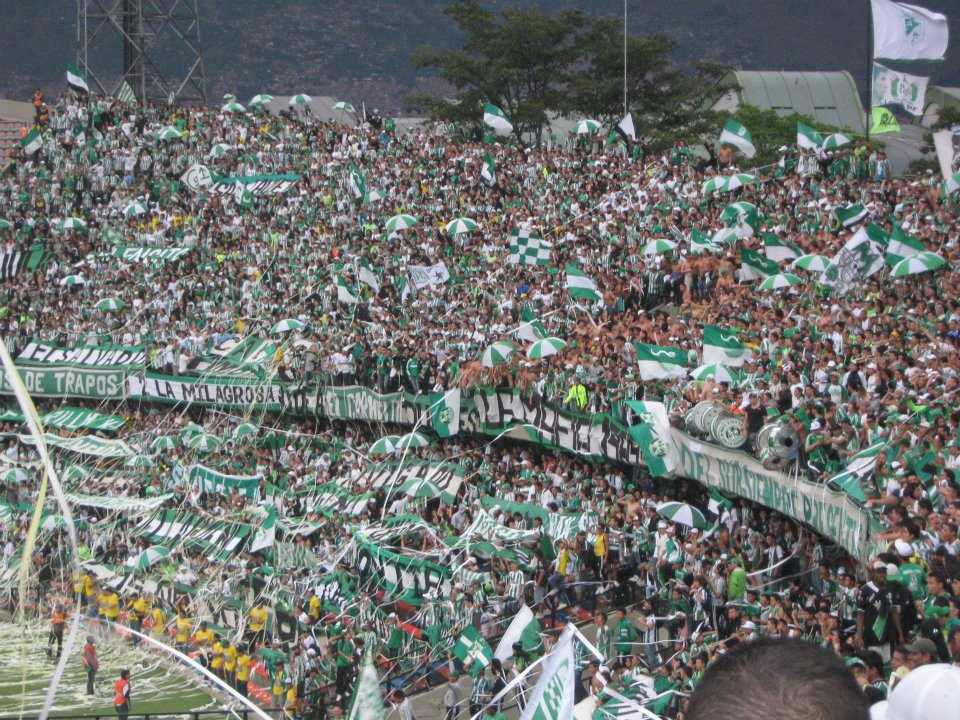 Imagen de Los del Sur - Atletico Nacional